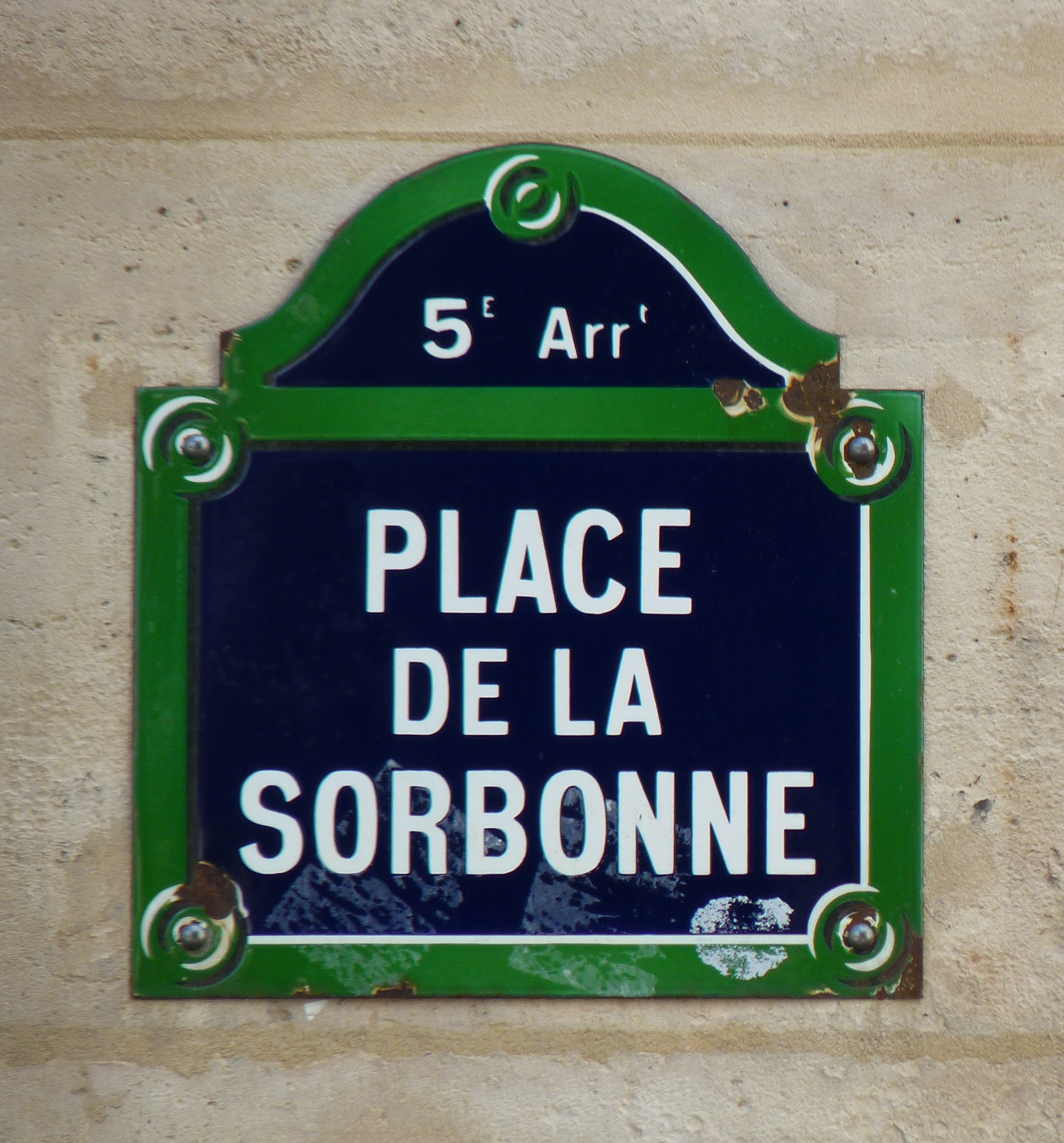 Place de la Sorbonne (Paris)